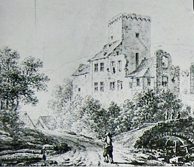 Peter Gayer, Zeichnung von Burg Reipoltskirchen, Pfalz